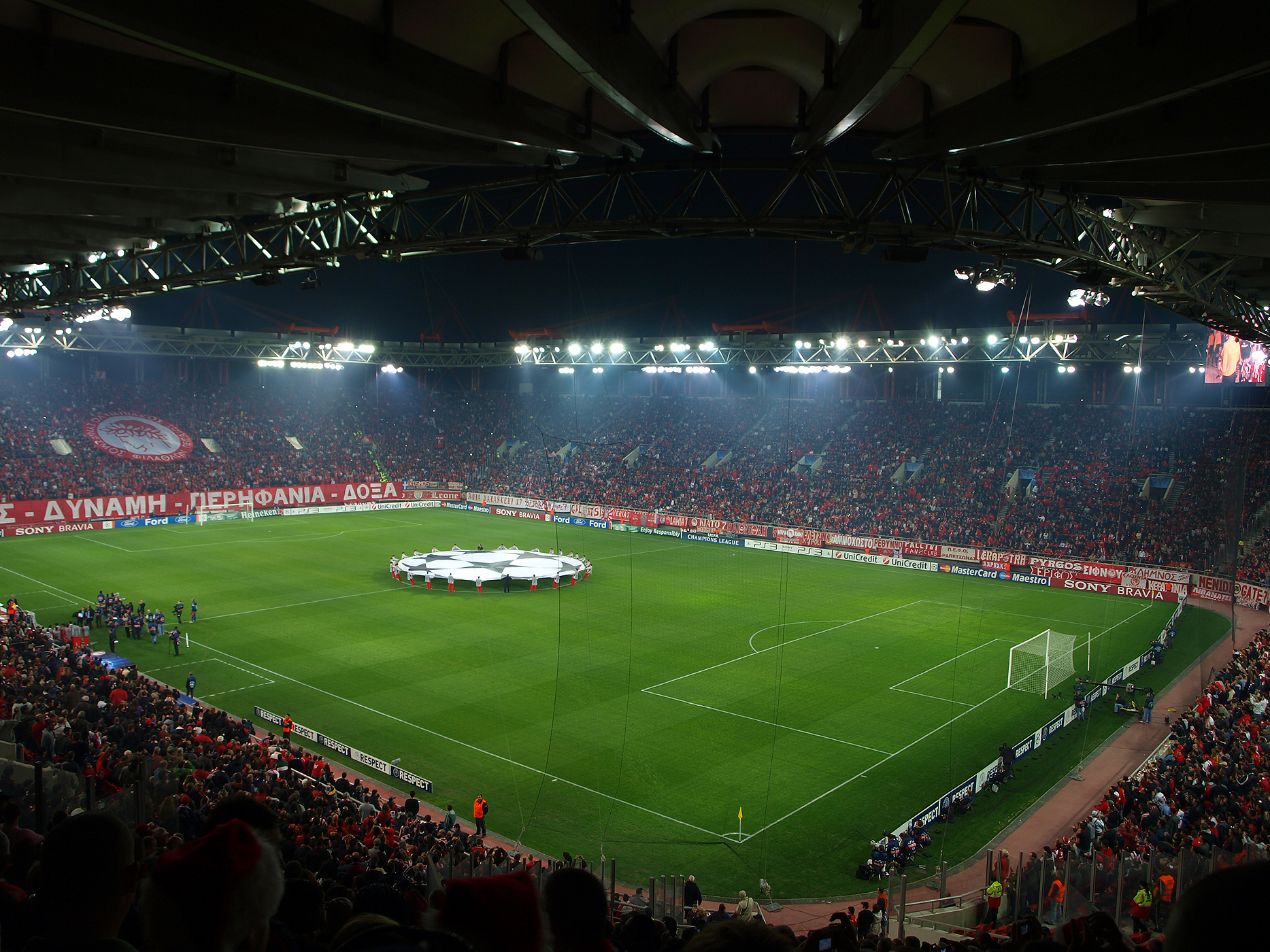 Karaiskakis Stadium Piraeus before Olympiacos-Arsenal